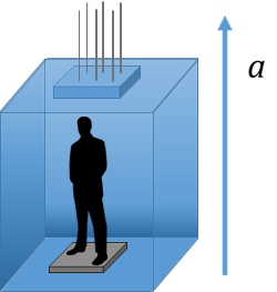 Picture of observer standing on a scale in a moving lift